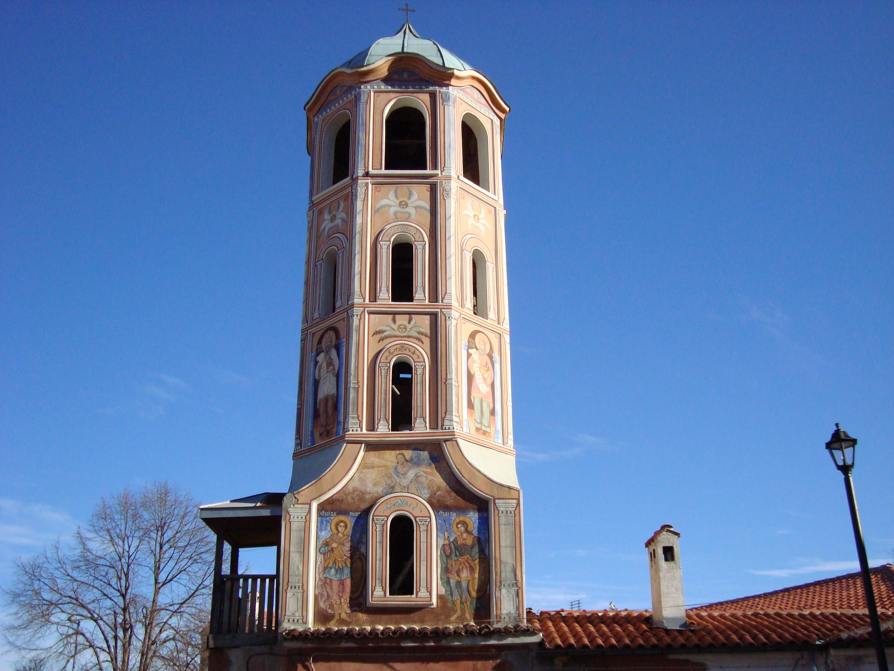 Грам "Света Богородица", Асеновград